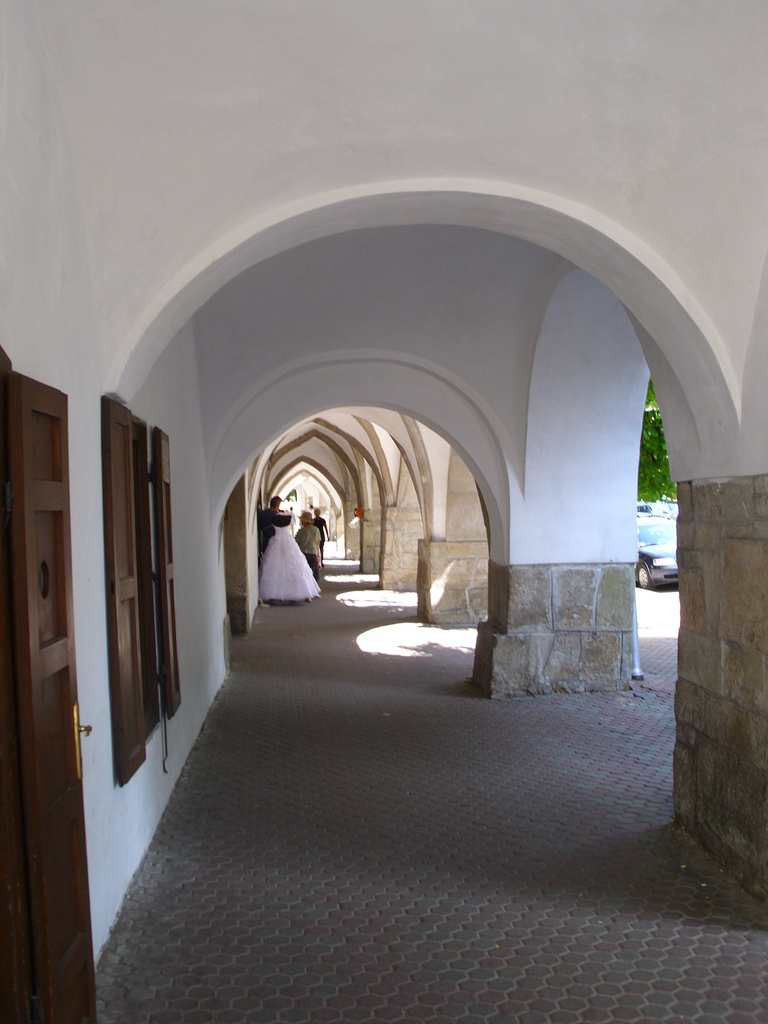 Bucata din zid din Piata Unirii